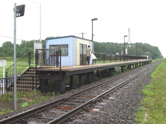 西御料駅 撮影場所 西御料駅そば踏切